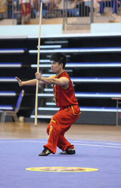 Nangun Wushu